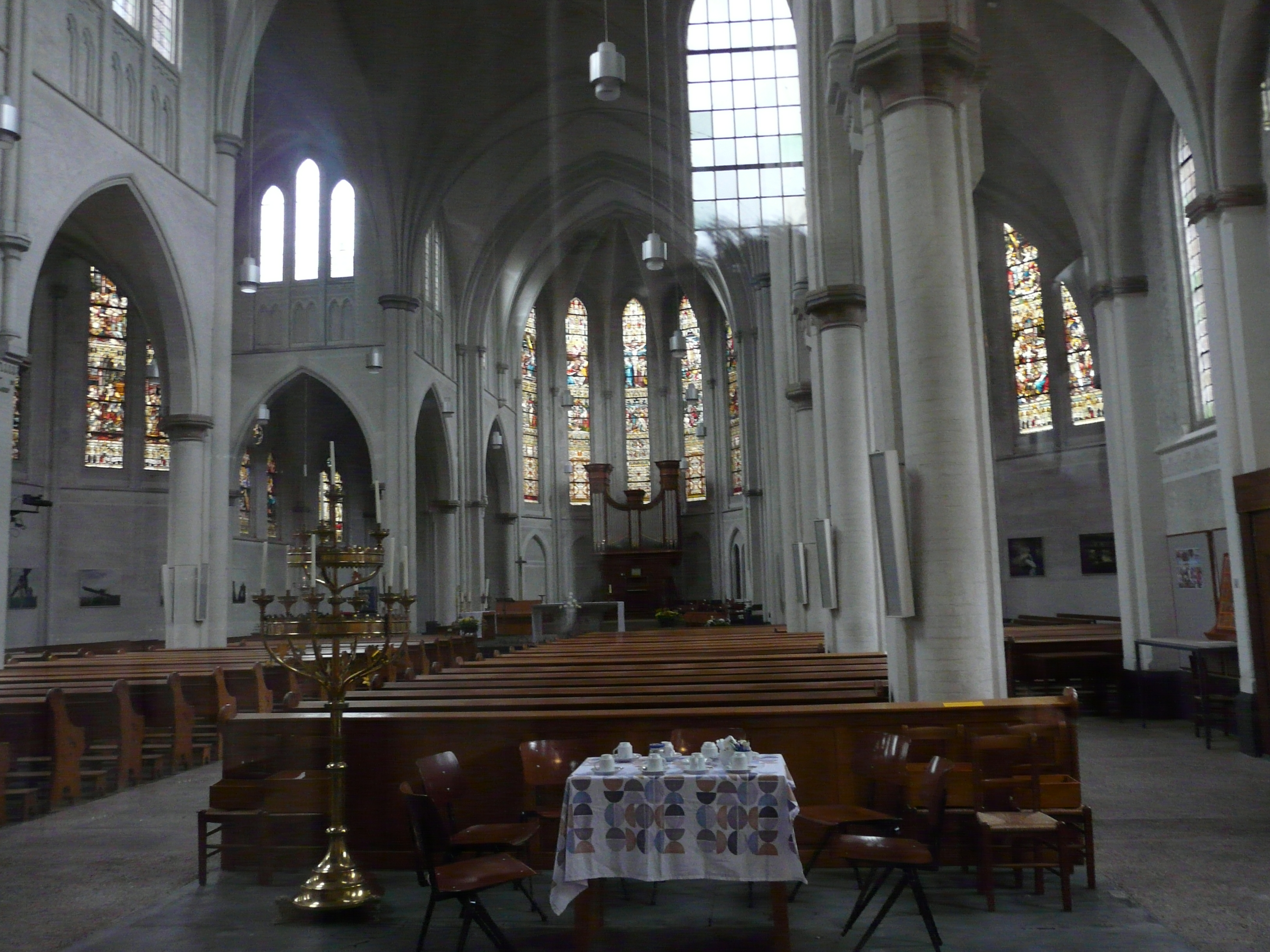 Sint-Laurentiuskerk in Ulvenhout